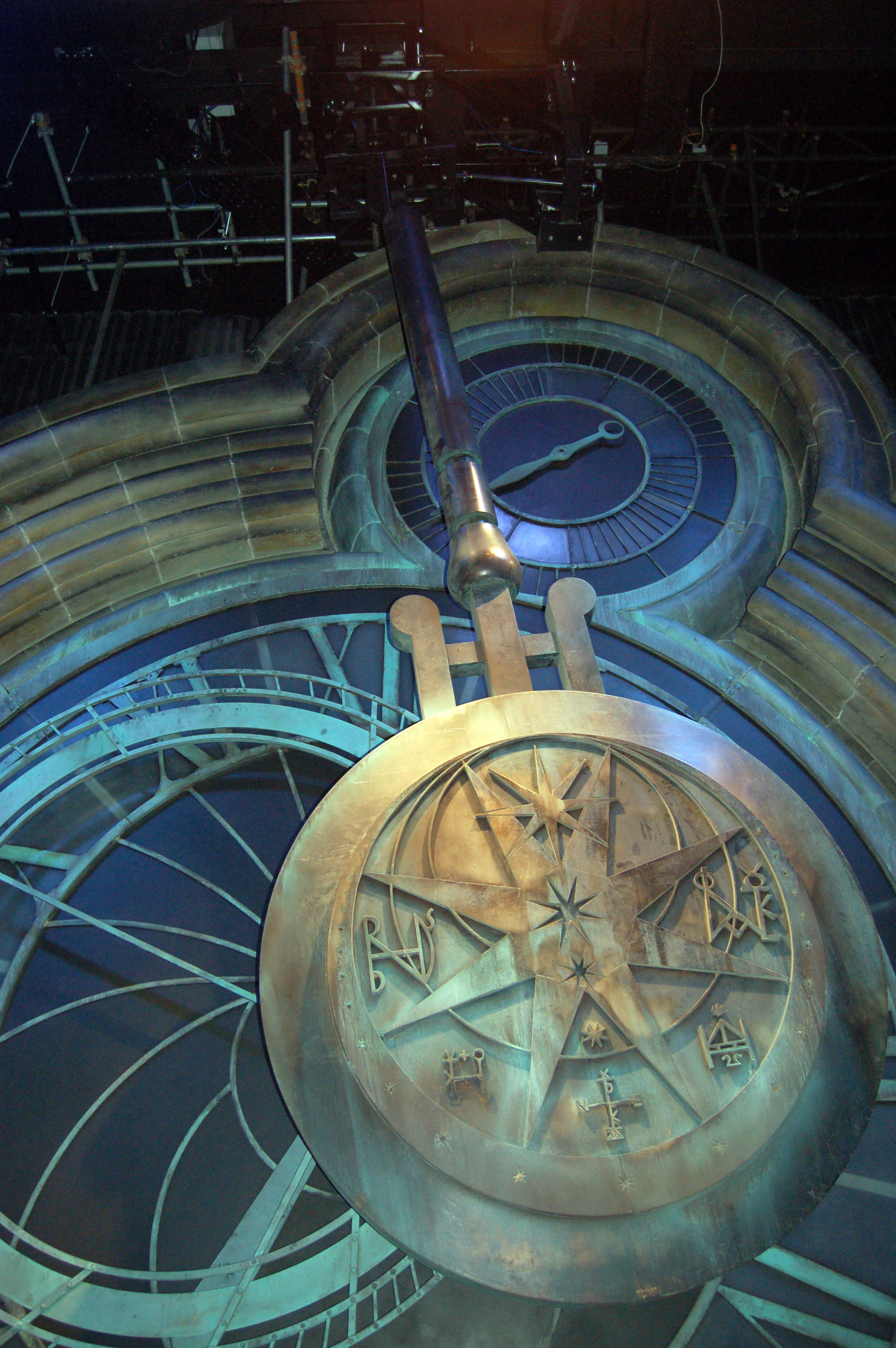 Giant Pendulum